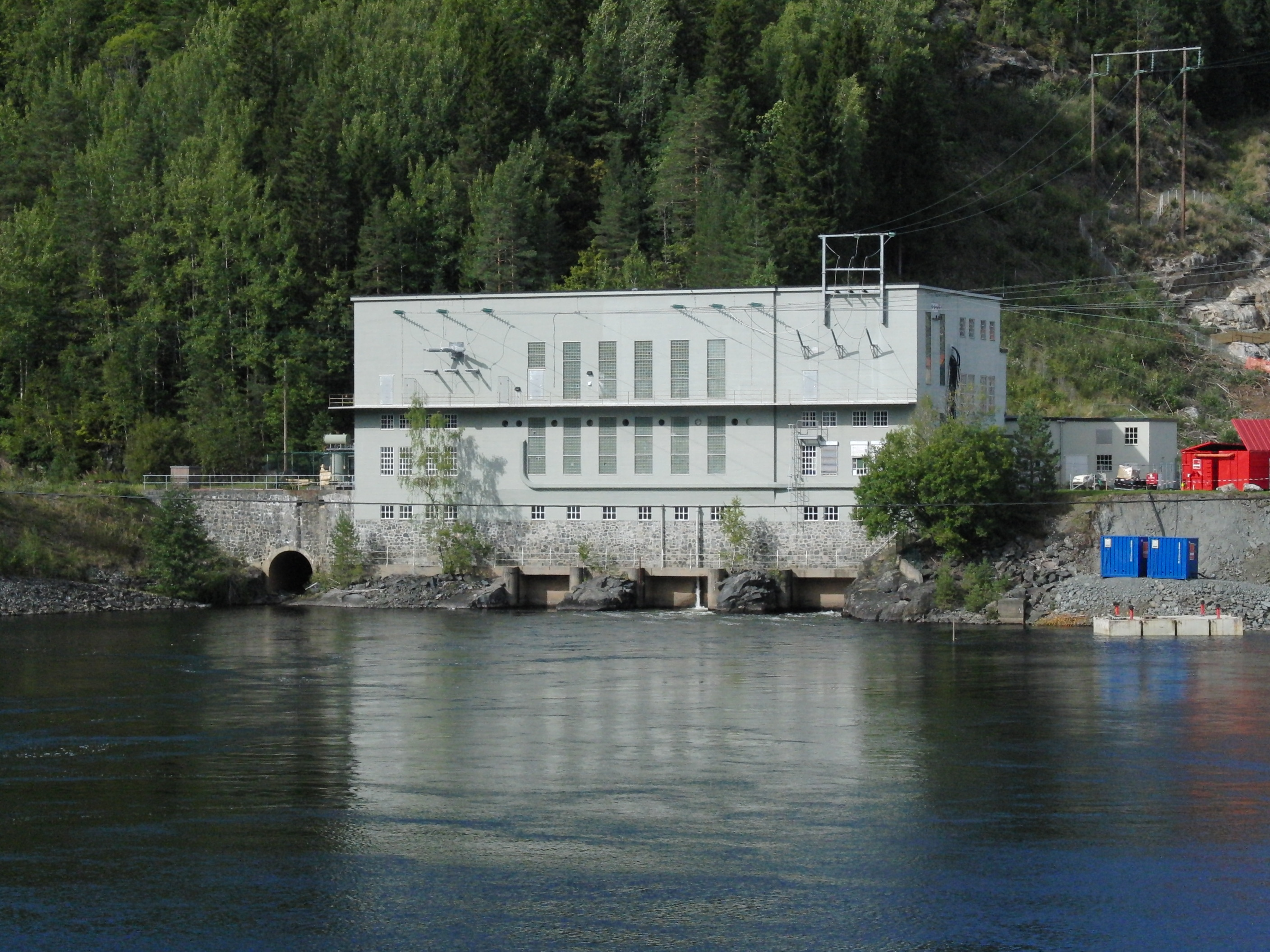 Iveland kraftverk